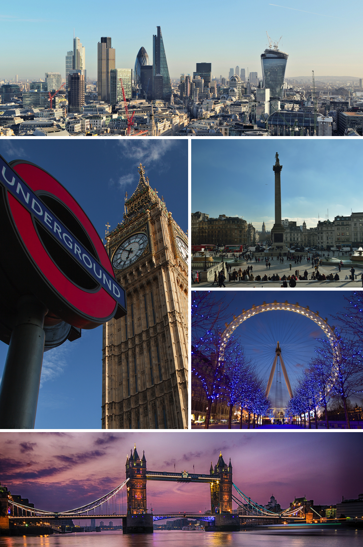 London